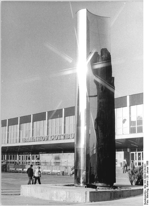 Cottbus, Bahnhof, Bahnhofsvorplatz, Stehle ADN-ZB Weißflog 20.1.88 Cottbus: Der Metallgestalter Manferd Vollmert schuf gemeinsam mit dem Cottbuser Holzgestalter Heinz Garzella die Stehle mit dem Titel "Energetische Reflexionen", die vor dem Cottbuser Bahnhof ihren Standort gefunden hat. Es ist eine Kombination von hochpoliertem Edelstahl mit jahrtausend alter Mooreiche aus einem Lausitzer Tagebau, die seit Ende 1987 die Blicke der Passanten auf sich zieht. Manfred Vollmer erfüllte sich damit ein langgehegter Wunsch. Der Künstler aus Seidewinkel bei Hoyerswerda ist seit mehreren Jahren als Abgeordneter tätig. (siehe auch 20N und ADN-Meldung vom 20.1.88)